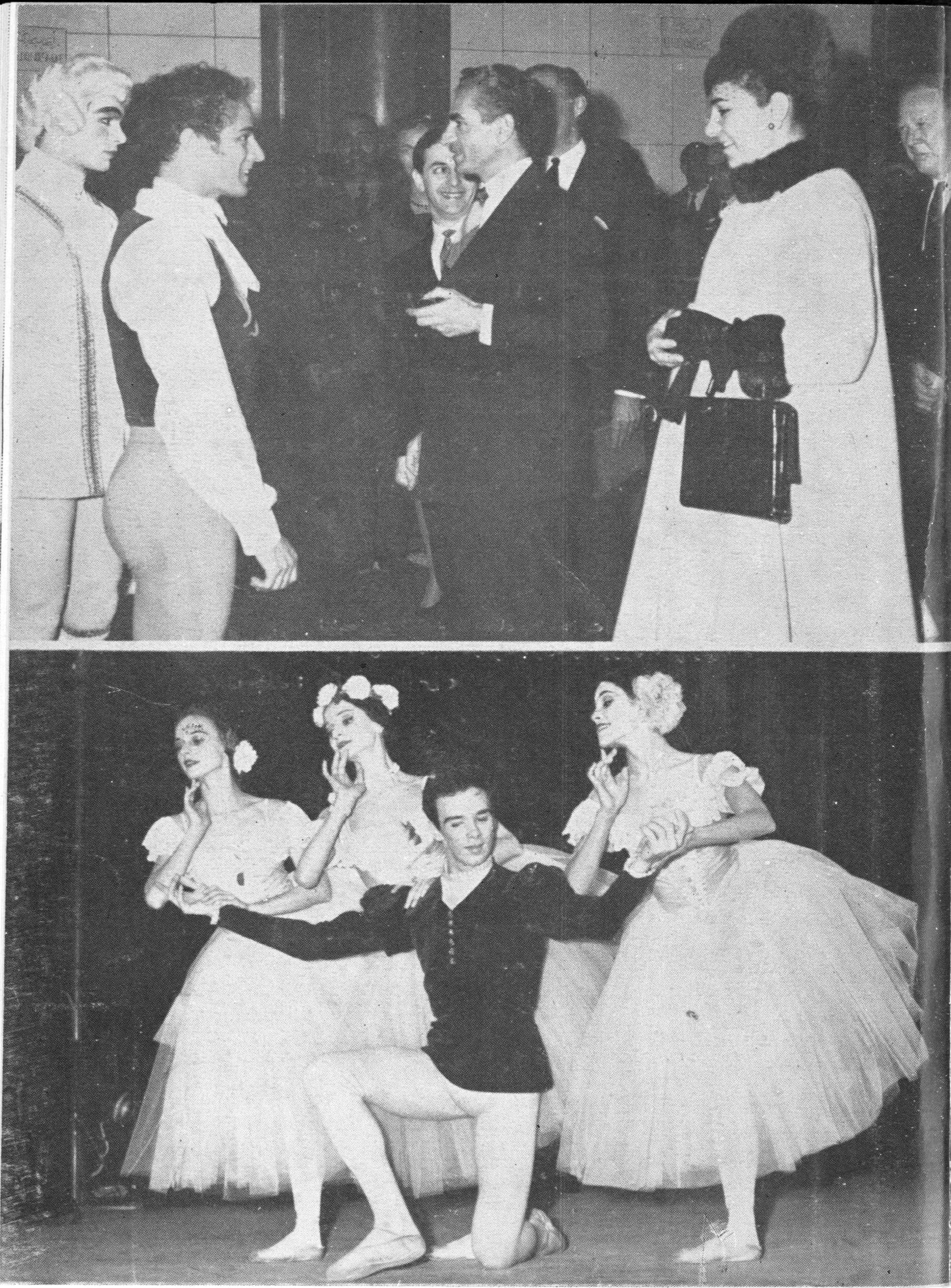 محمدرضا پهلوی، فرح دیبا و هنرمندان گروه باله رابرت جفری